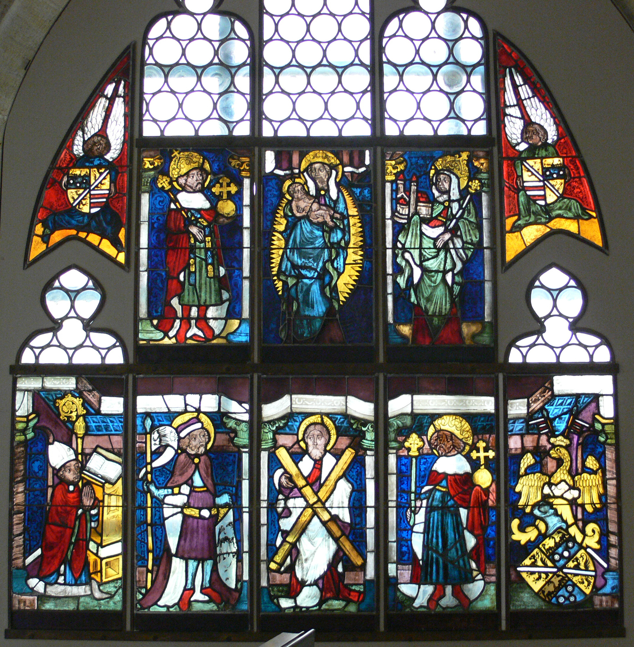 Diözesanmuseum Bamberg Fenster aus der Andreaskapelle im Domkreuzgang, Franken (vermutl. Bamberg), um 1414, zahlreiche Ergänzungen, Stiftung des Bischofs Albrecht von Wertheim